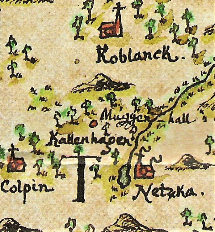 Ausschnitt Katzenhagen Karte XXI aus dem Mecklenburg-Atlas von B. C. von Hoinckhusen (um 1700), Landeshauptarchiv MV